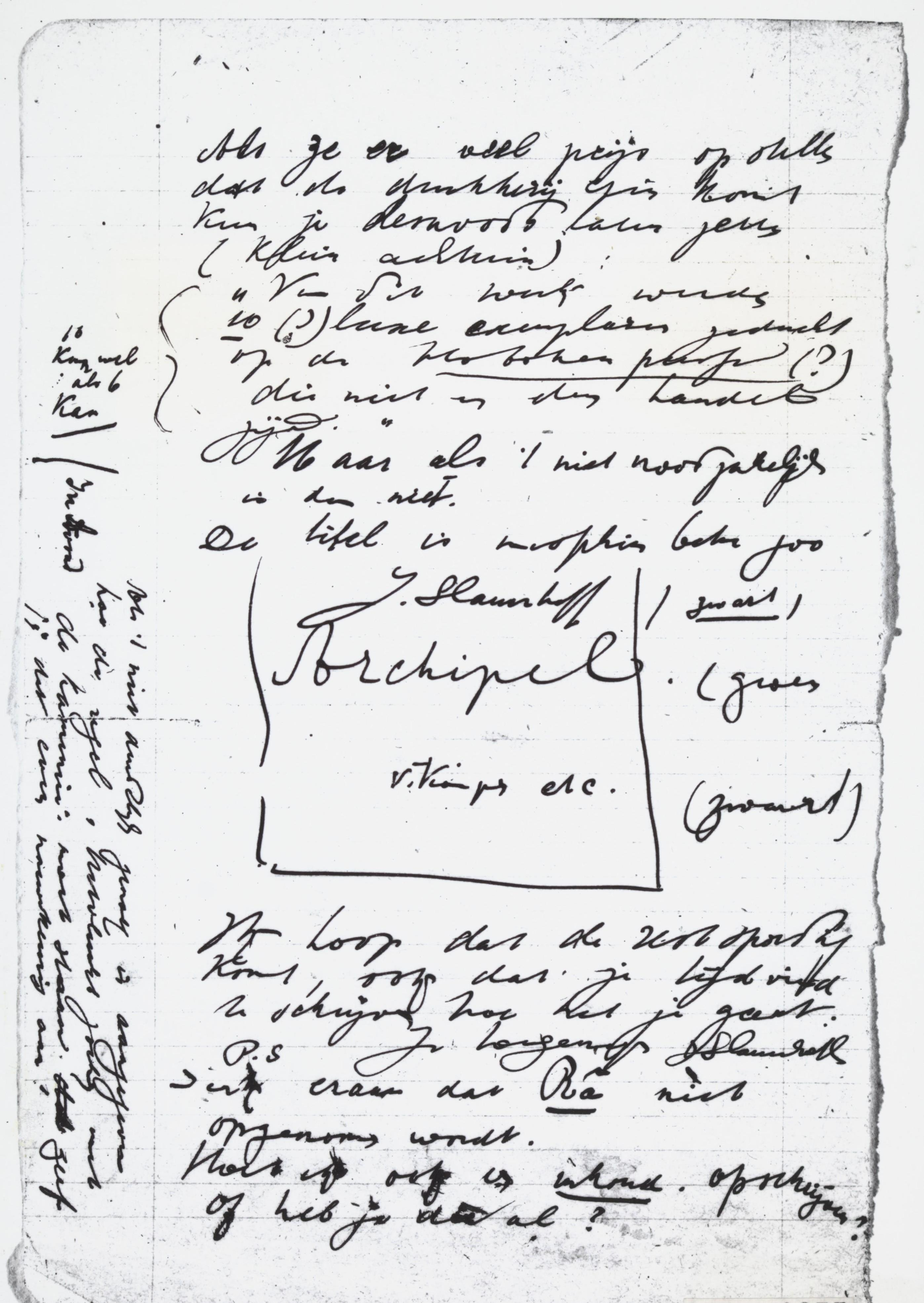 Een handgeschreven brief van Jan Jacob Slauerhoff aan Arthur Lehning over de uitgave van de dichtbundel "Archipel" (1923)